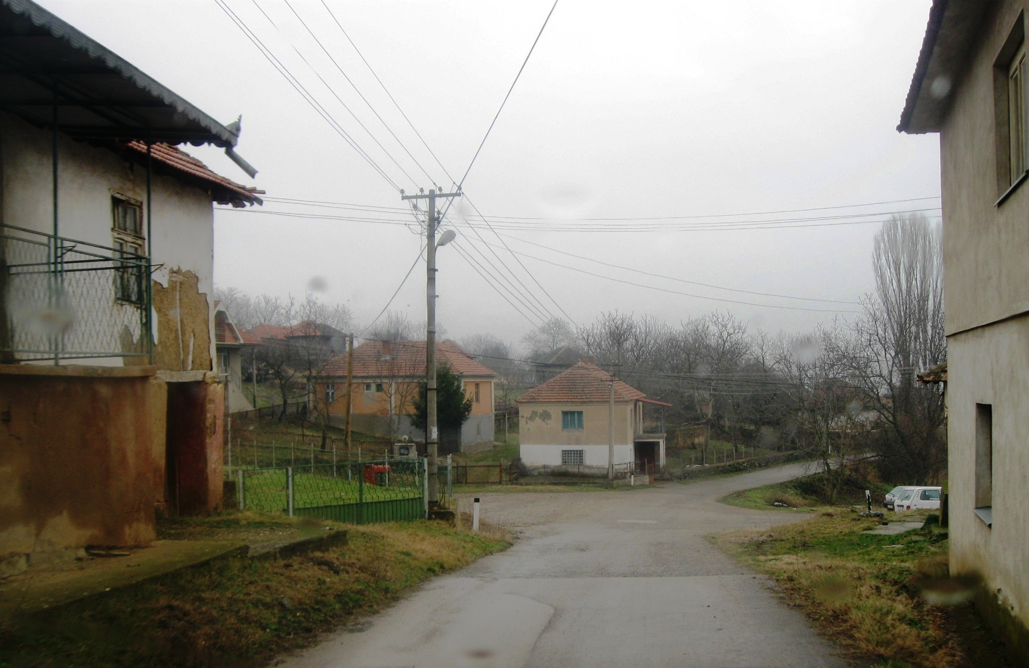 Orane